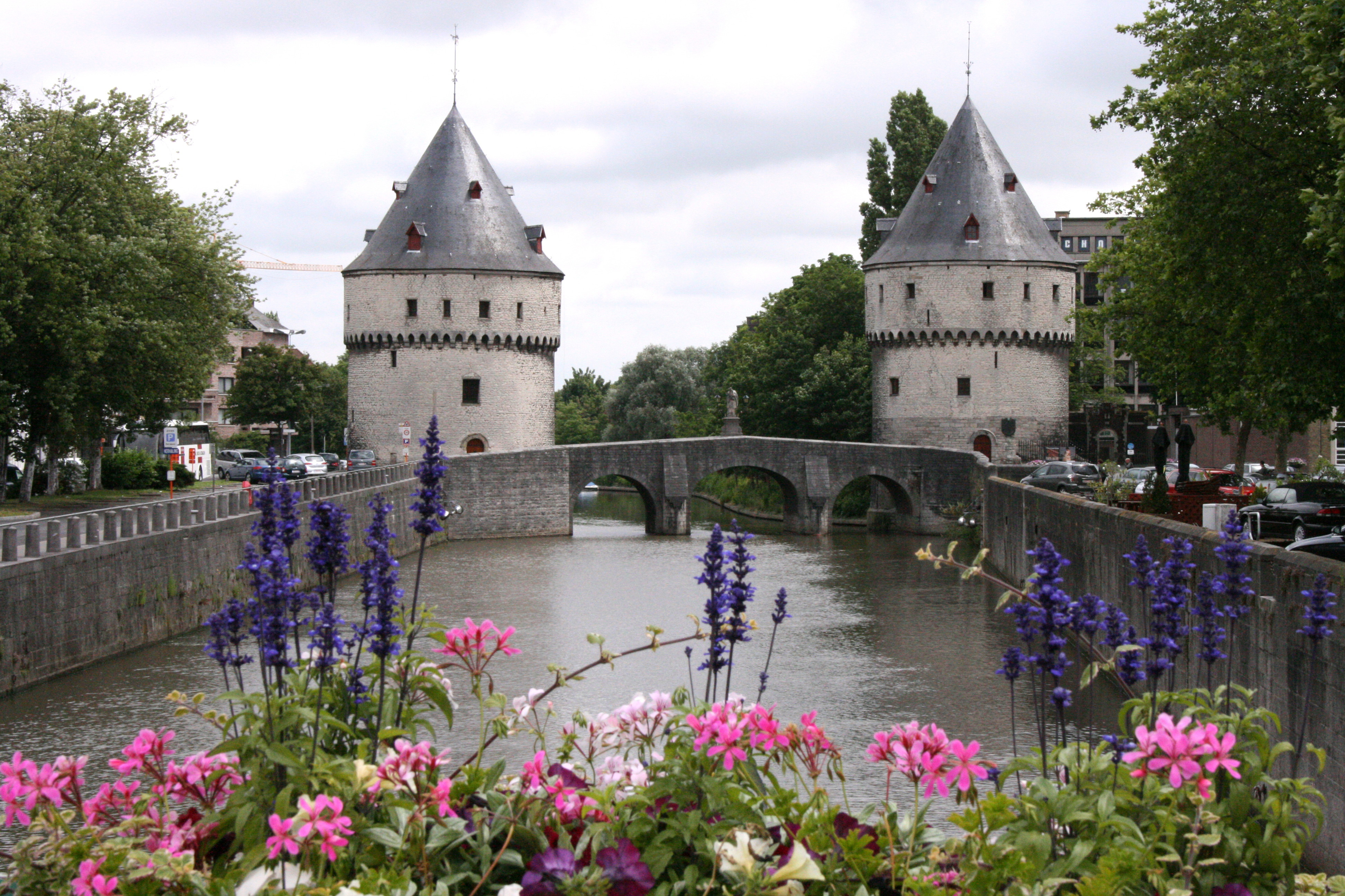 Kortrijk : Broeltorens Courtrai : tours du Broel